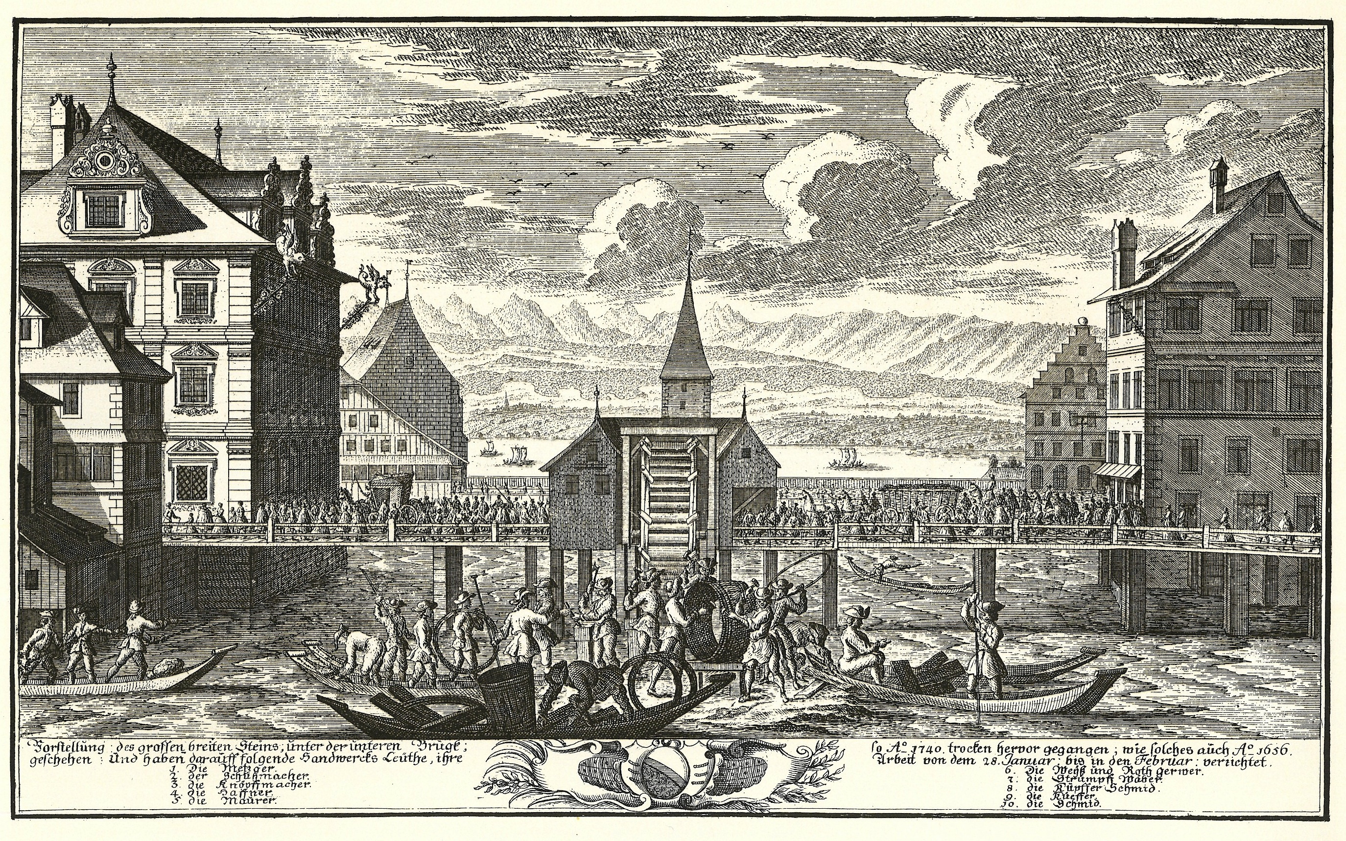 Rathausbrücke Zürich: Küfer auf dem Limmatstein bei der Arbeit an einem grossen Fass